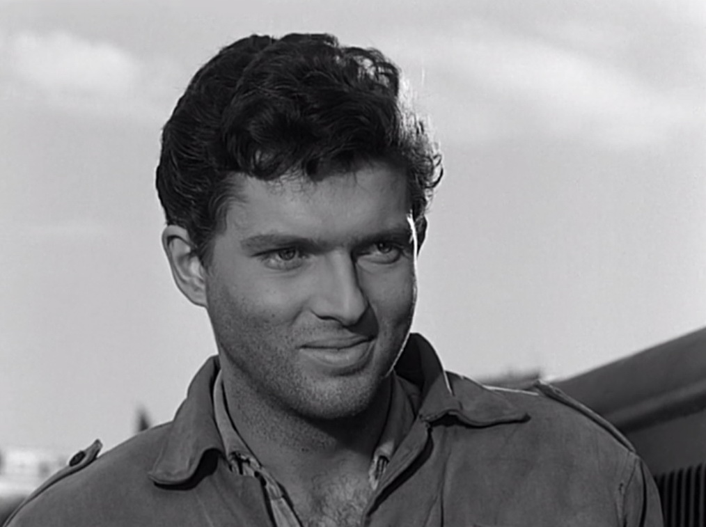 Screenshot dal film Esterina (1959)